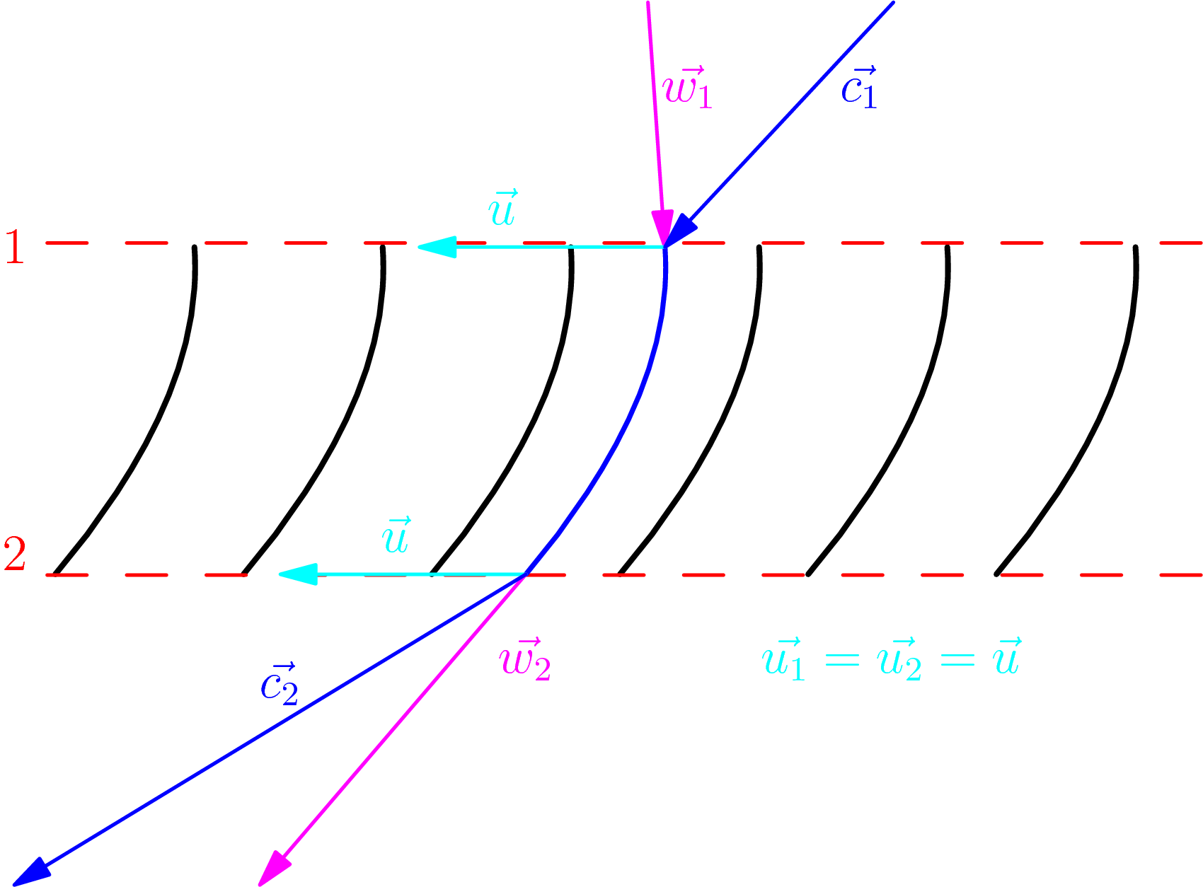 cinemática de una tubompaquina axial